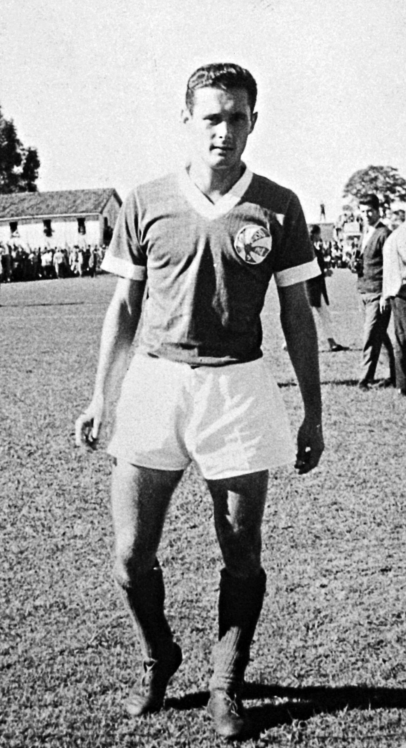 Bebeto (Alberto Vilasboas dos Reis), o "Canhão da Serra", quando chegou ao Gaúcho em 1967